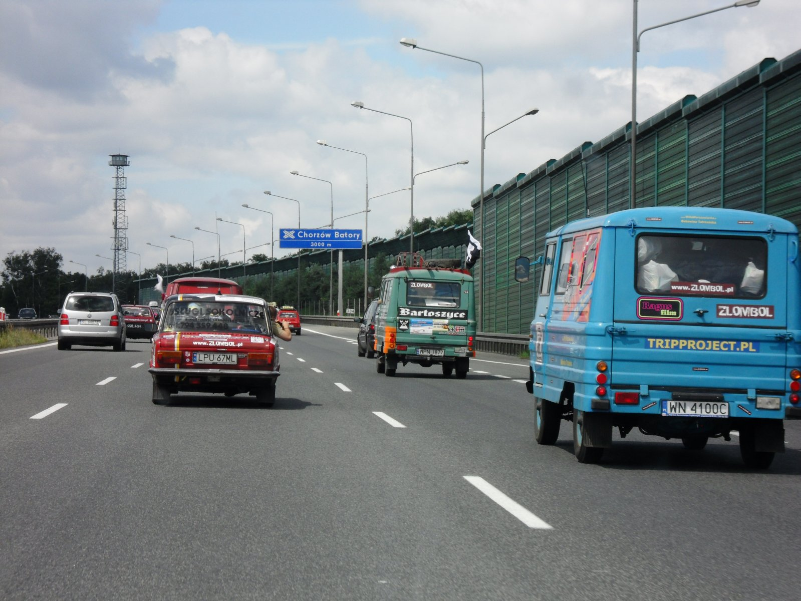 Auta na rajdzie Złombol 2011